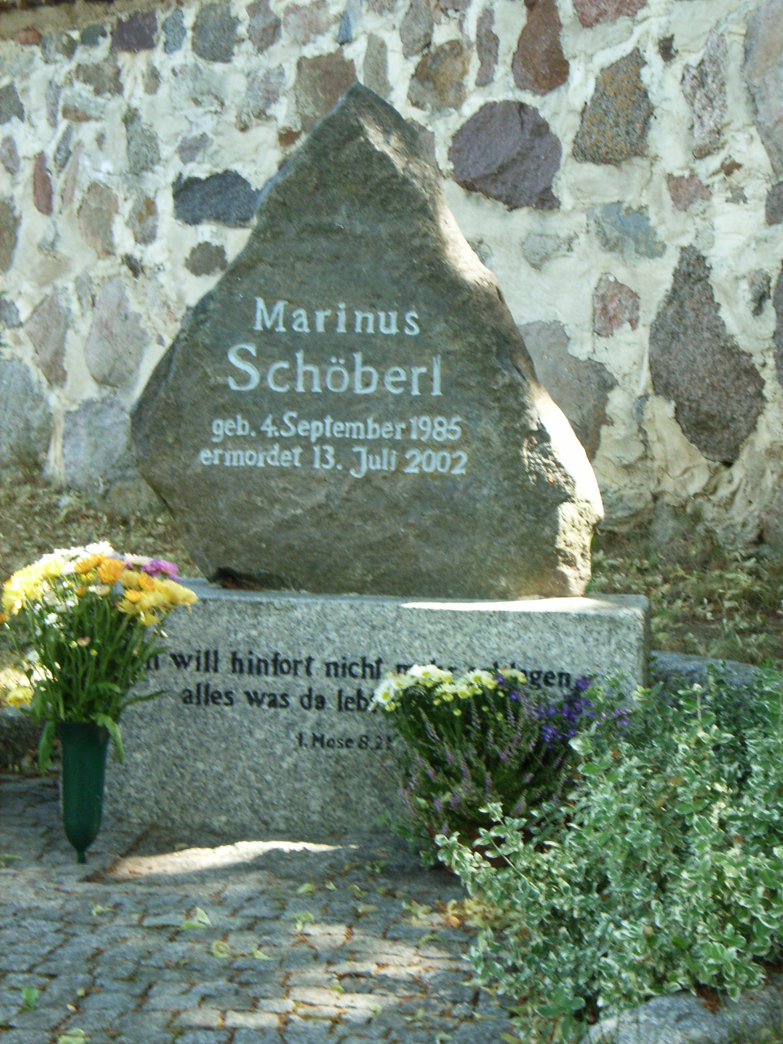 Grabstein von Marinus Schöberl in Potzlow (Brandenburg)